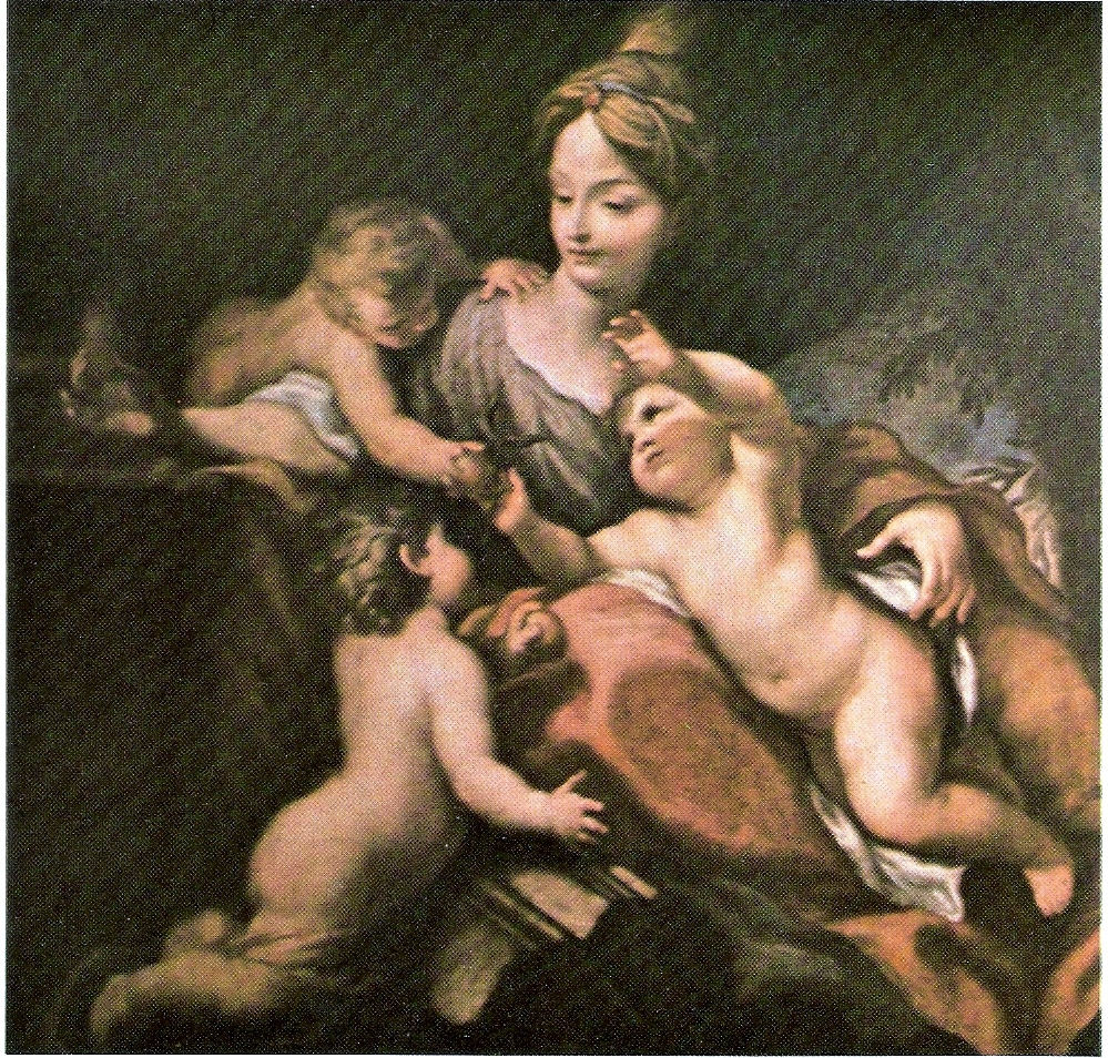 Dipinto del pittore Domenico Piola raffigurante l'"Allegoria della carità" conservato presso il palazzo Bianco di Genova